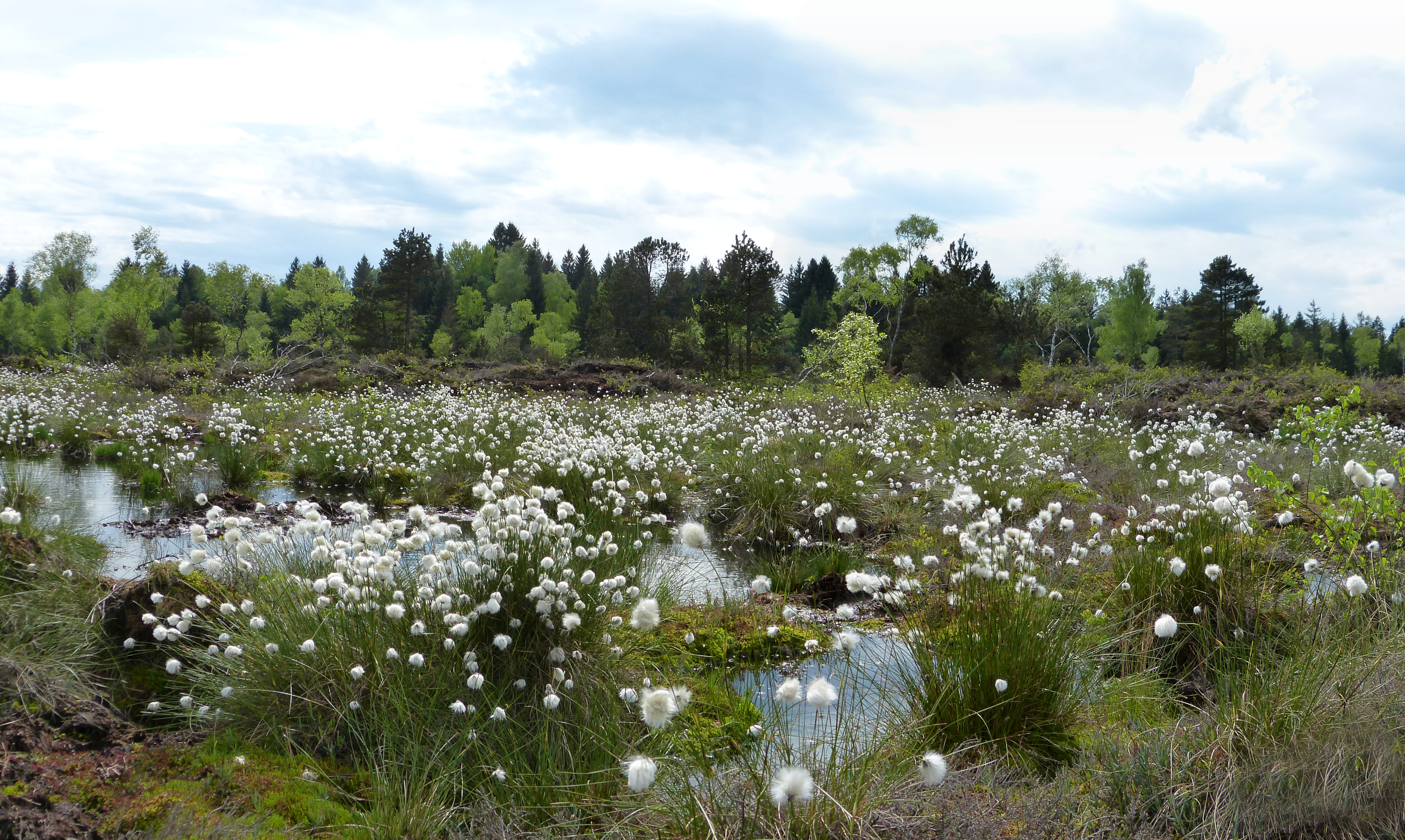 NSG-4.161 Arrisrieder Moos 650mNN Naturraum: Westallgäuer Hügelland. Arrisried bei Kisslegg. Verheideter Hochmoorrest mit Spirken, Kiefern und Birken. Torfschicht etwa 5m mächtig. Randbereiche mit Übergangs- und Niedermoorbereiche mit Fichten und Schwarzerlen. Seit 2014 zahlreiche Wiedervernässungsmaßnahmen.